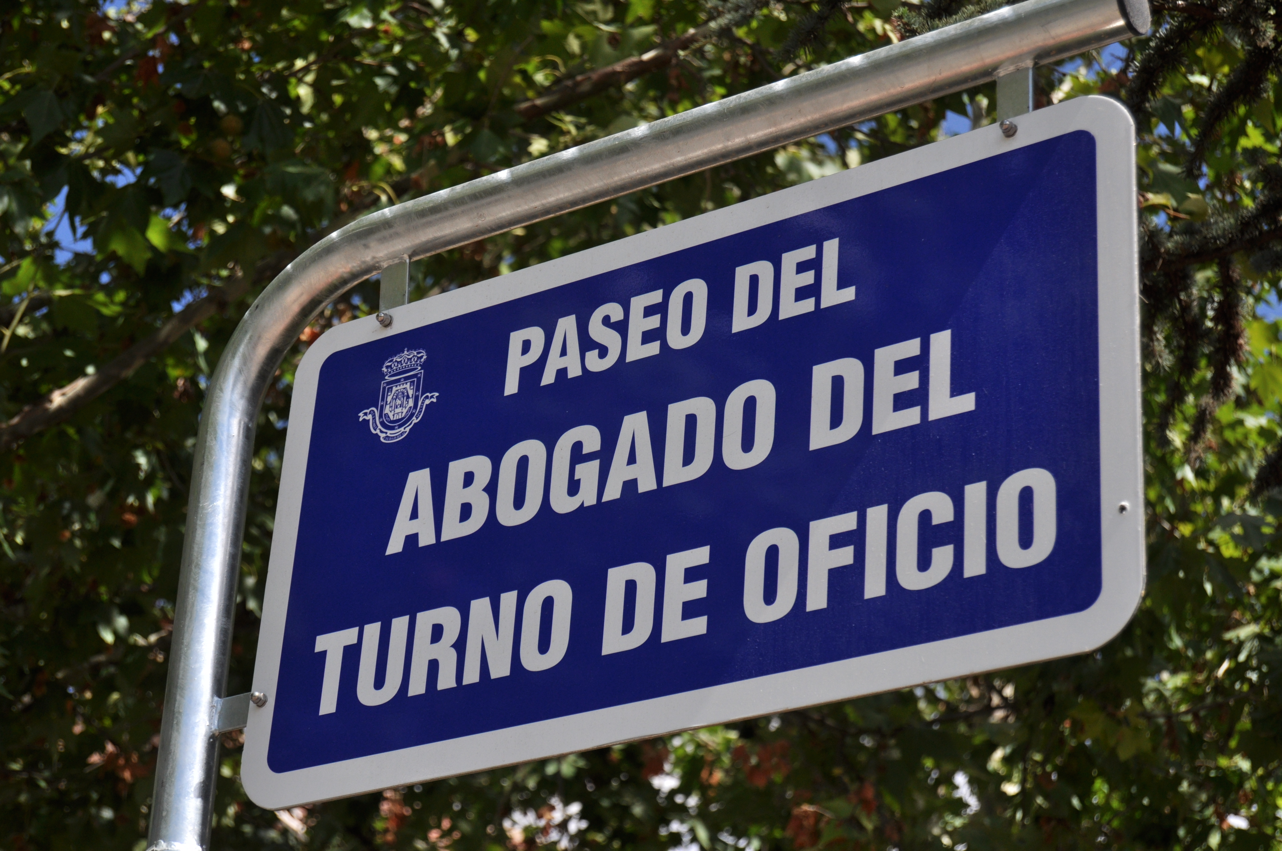 Ciudad Real Capital - 082. Placa del paseo del Abogado del Turno de Oficio.